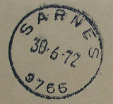 Siste dag Sarnes poståpneri (stempelavtrykk)